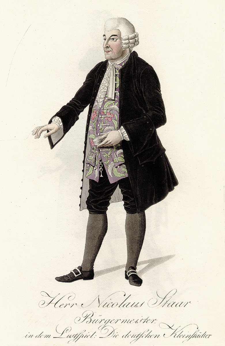 Kostüm Bürgermeister Nicolaus Staar aus August von Kotzebue: Die deutschen Kleinstädter Aus: Kostüme auf dem kön. National-Theater in Berlin. Band I und II, Berlin, Wittich, 1805-1808 (meist von J. F. Jügel oder L. W. Wittich nach H. A. Dähling)